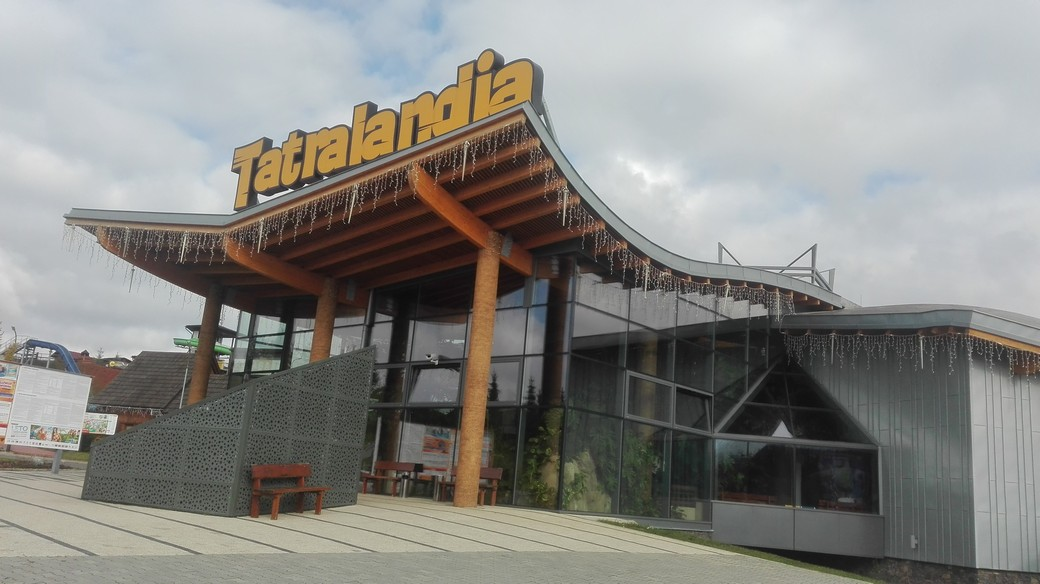 Vstupná hala